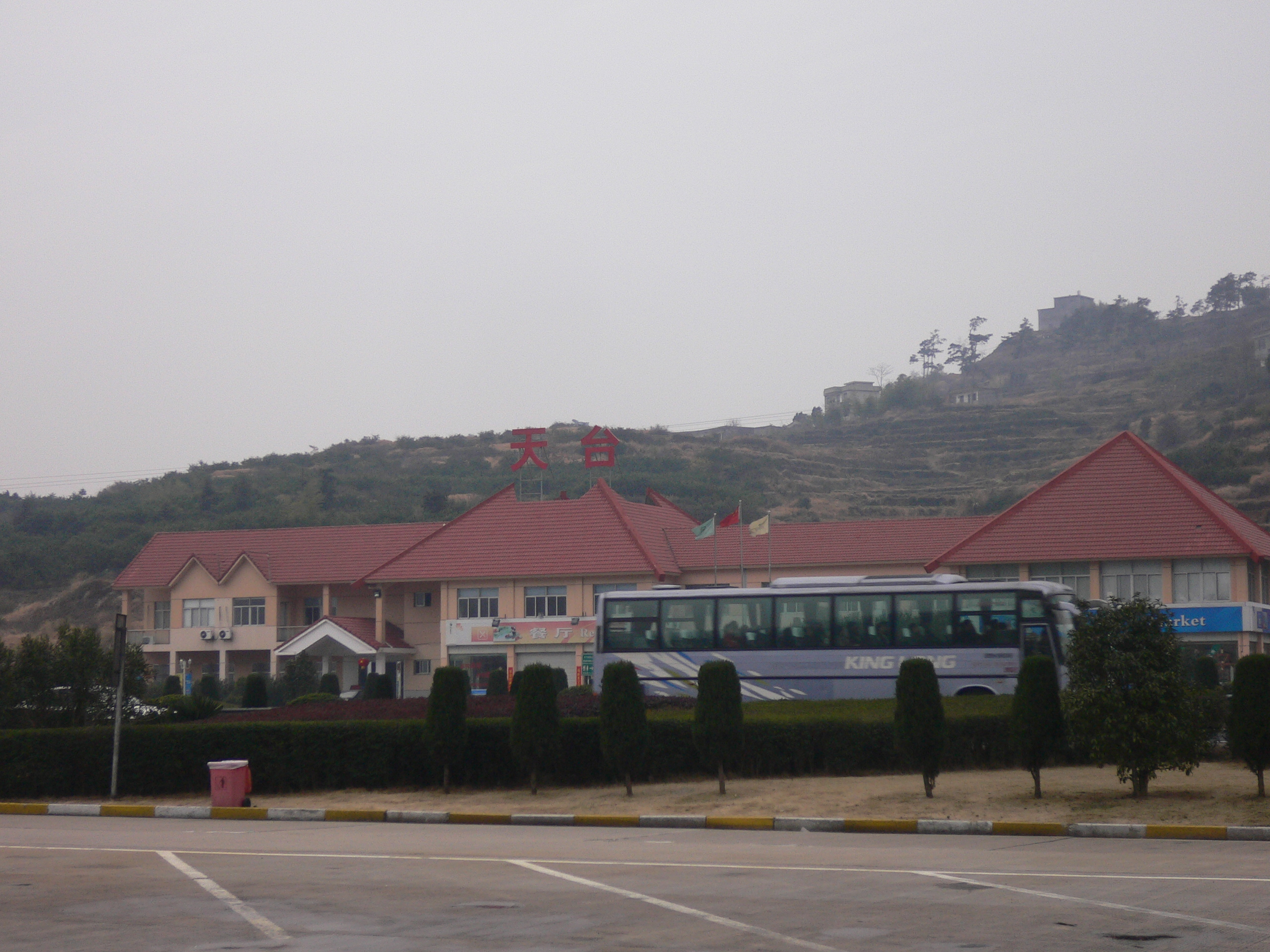 天台服务区